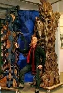 Movimiento neoexpresionismo abstracto, escultura en madera, avant-garde peso 80 kgs. altura 3 mts.